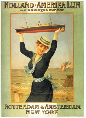 Jan van Beers, Hol.-Amerika Lijn via Boulogne s/Mer, 1898